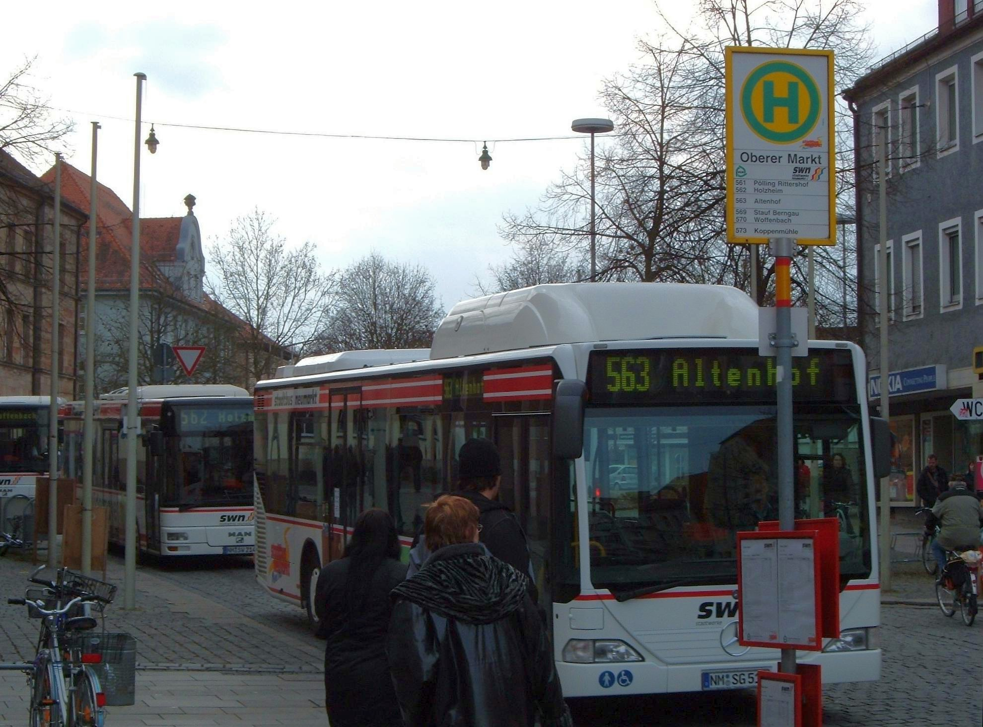 Neumarkt: Stadtbusse am Oberen Markt